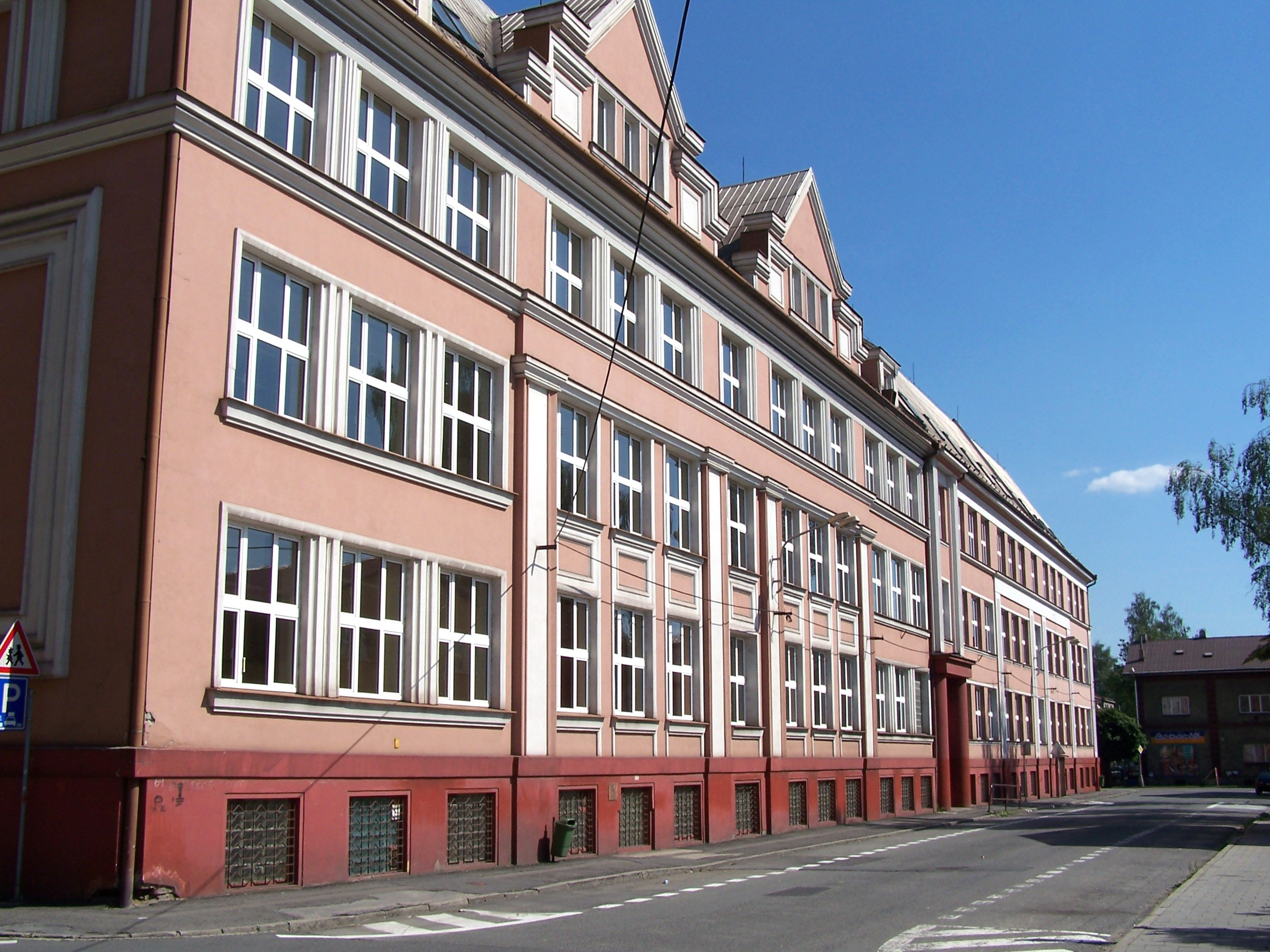 Polish primary school and grammar school (gymnasium) in Český Těšín (Czeski Cieszyn)